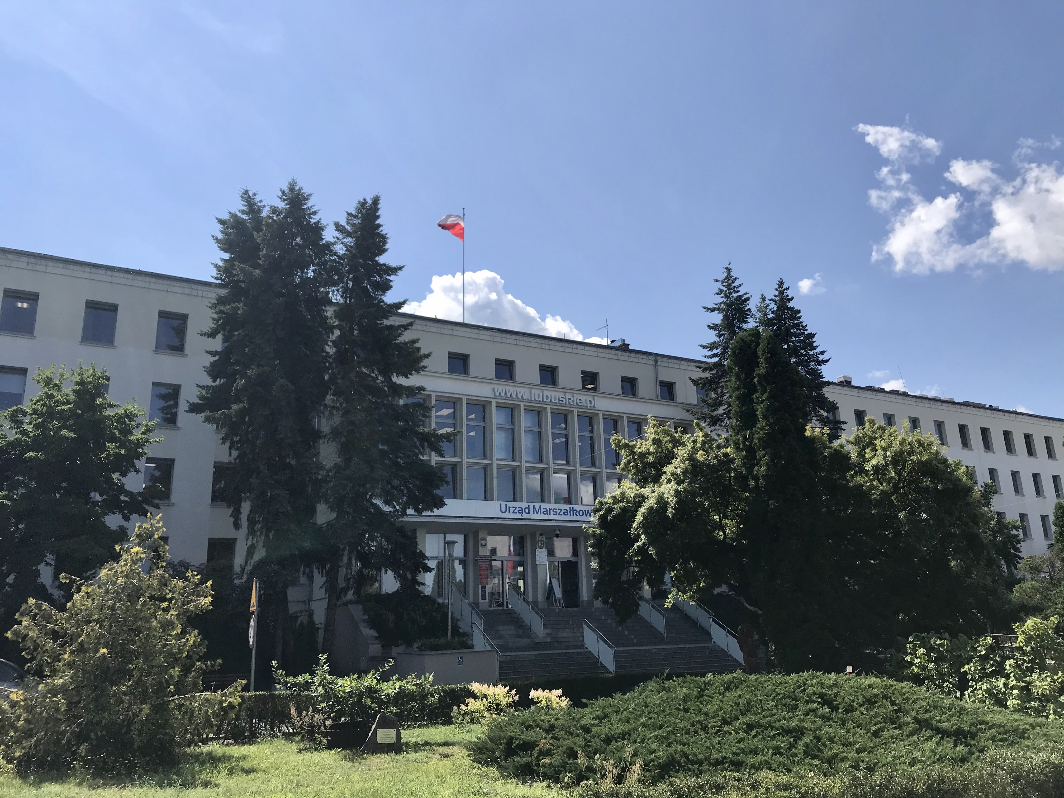 Urząd Marszałkowski w Zielonej Górze